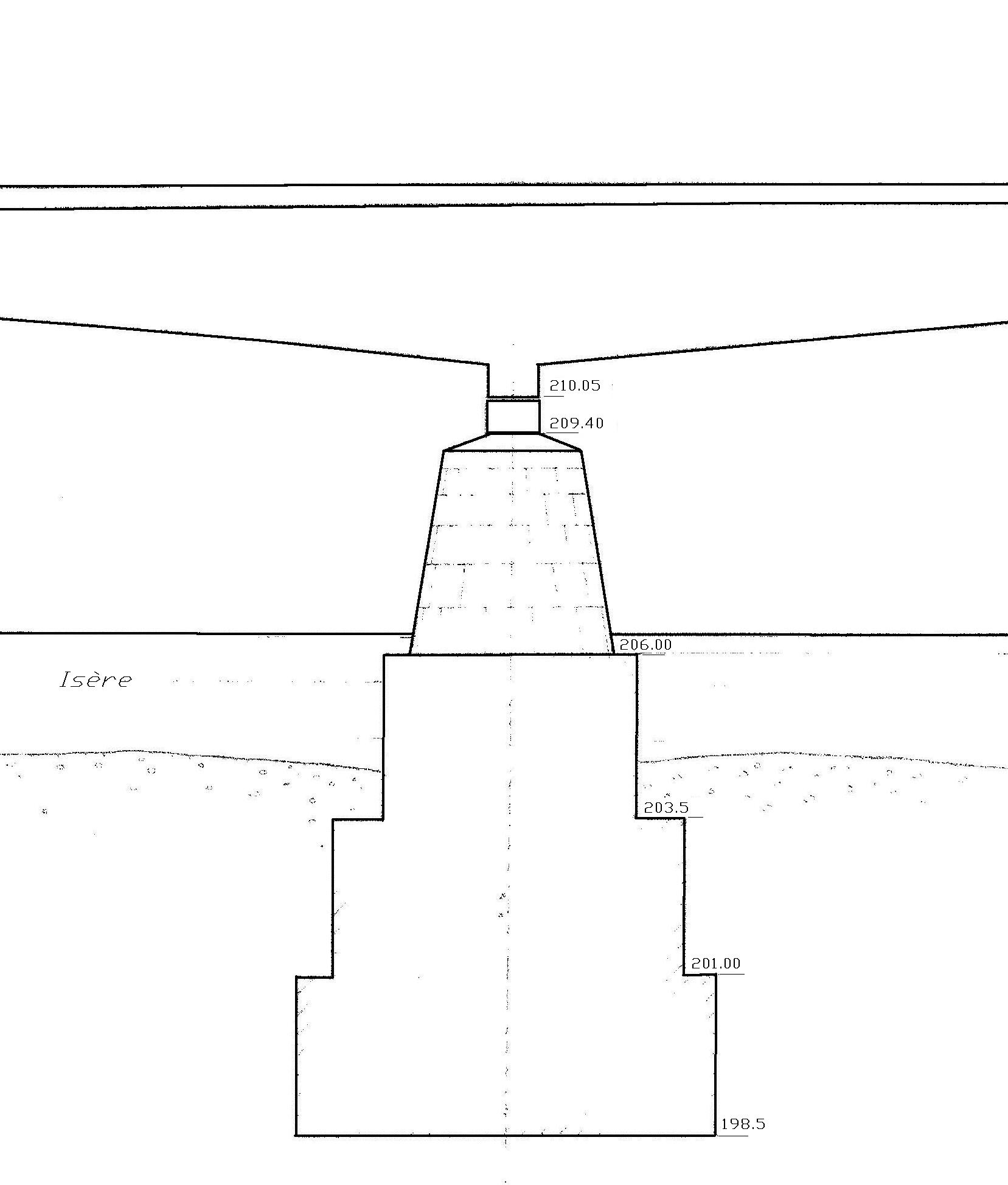 Détail d'une pile du pont de la Porte de France